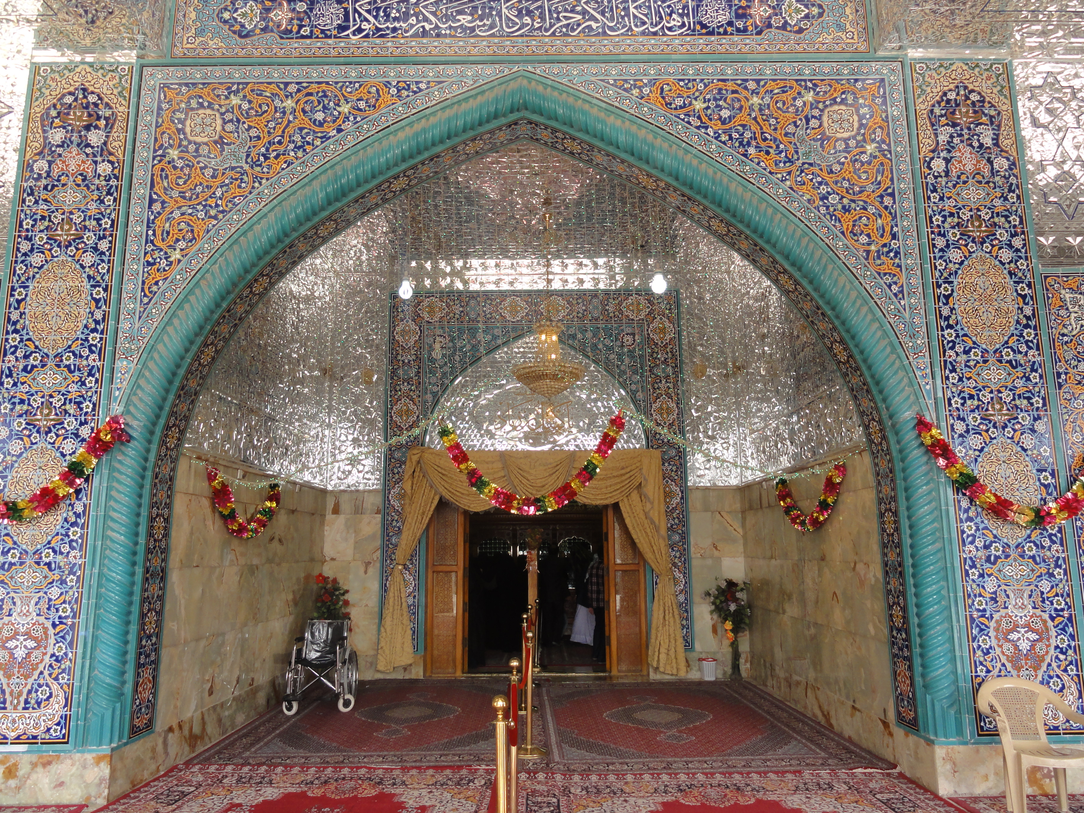 ورودی مقام کمیل بن زیاد